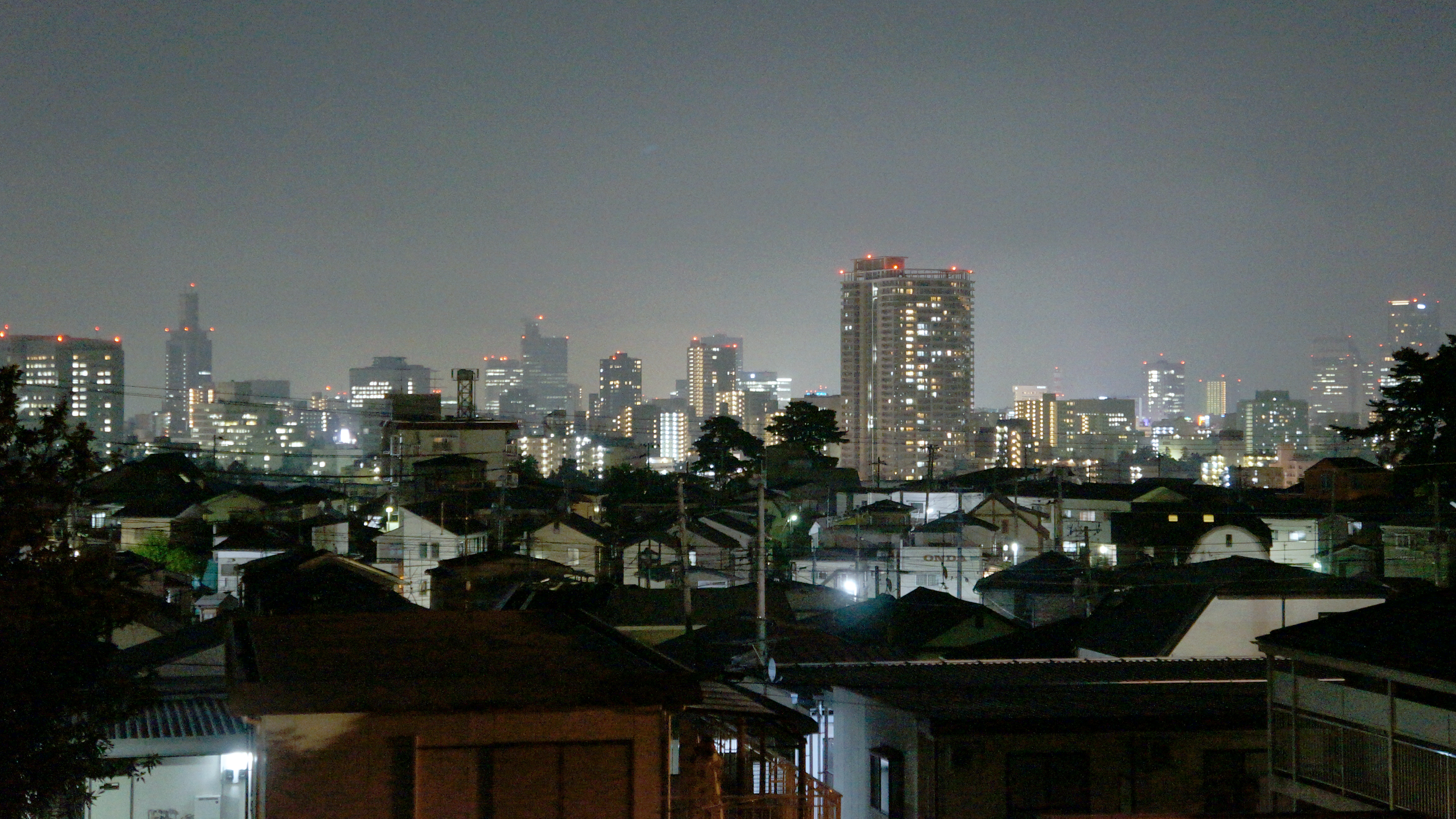 仙台市都心部の夜景